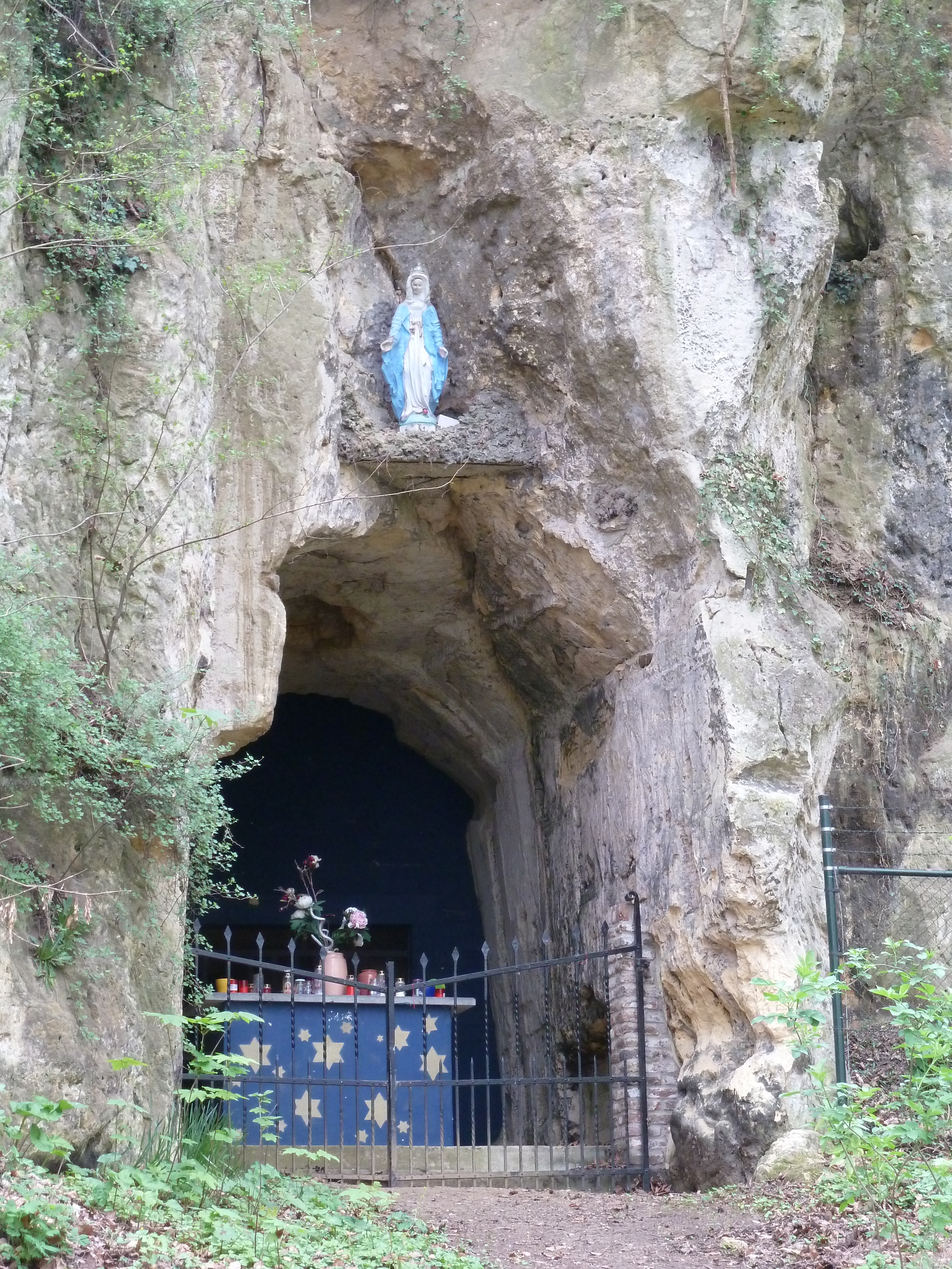 Mariagrot bij de Pater Kustersweg, Cadier en Keer, Limburg, Nederland